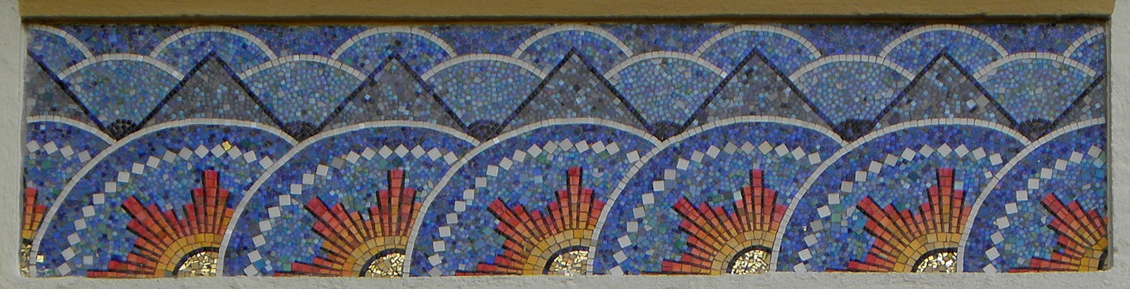 Mosaïques d'Isidore Odorico ornant l'usine Morel et Gâté de Fougères (35).